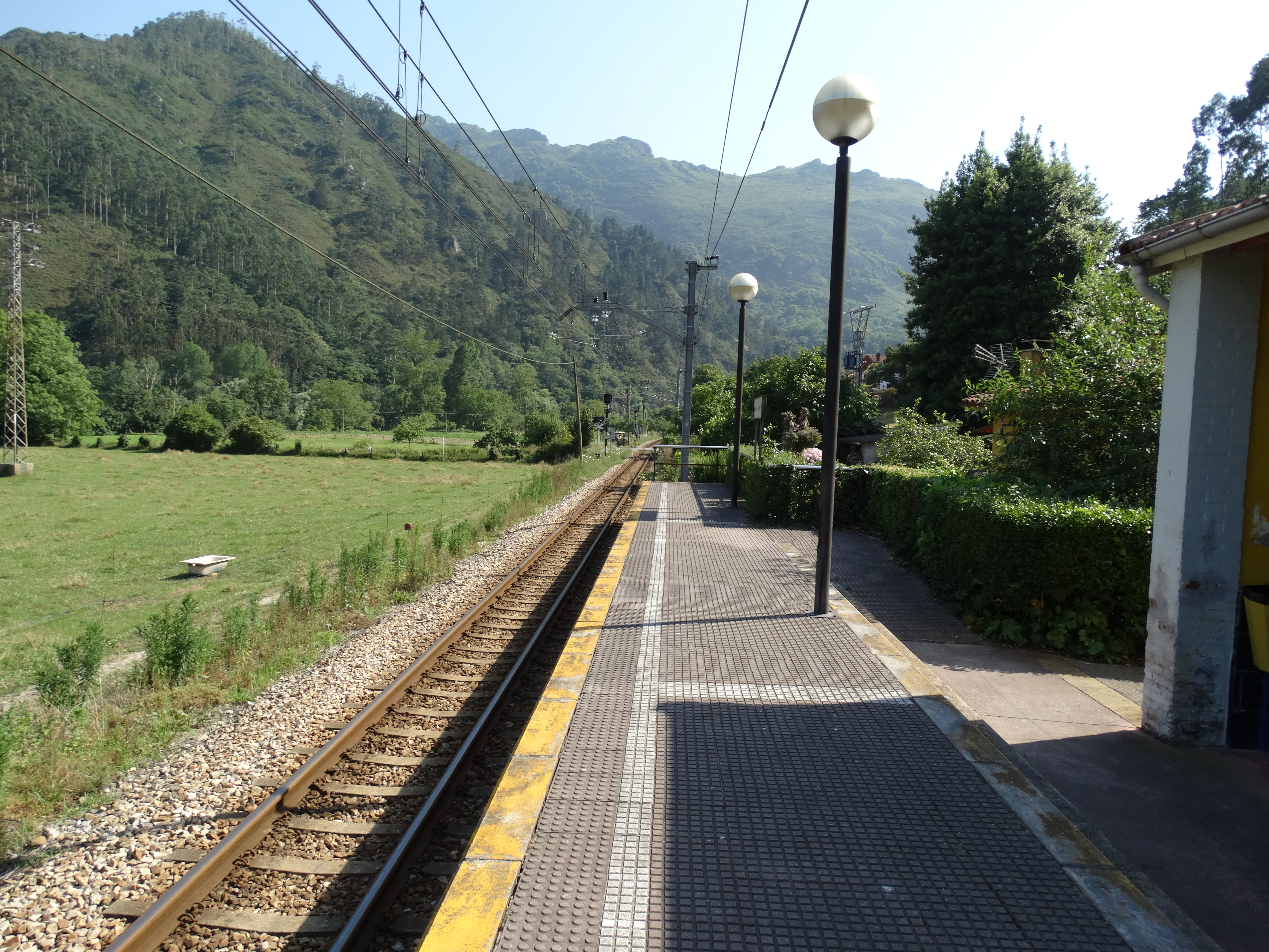 Núcleo de población de Cuevas en la parroquia de Junco, concejo de Ribadesella (Asturias, España). Estación del ferrocarril FEVE.